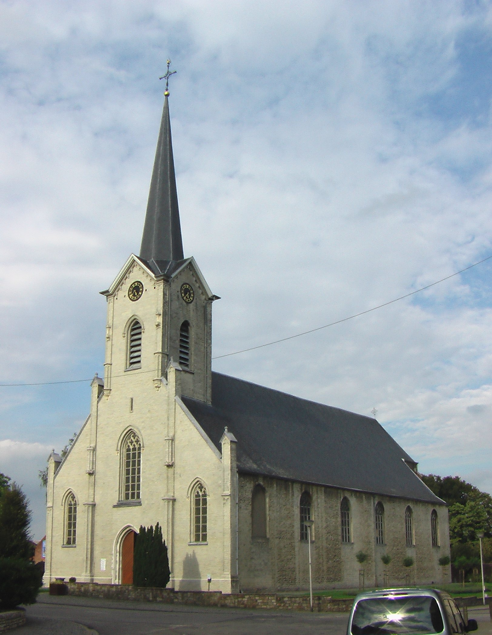 Sint-Amanduskerk Erps, huidige kerk werd gebouwd in 1864, gemeente Kortenberg, België